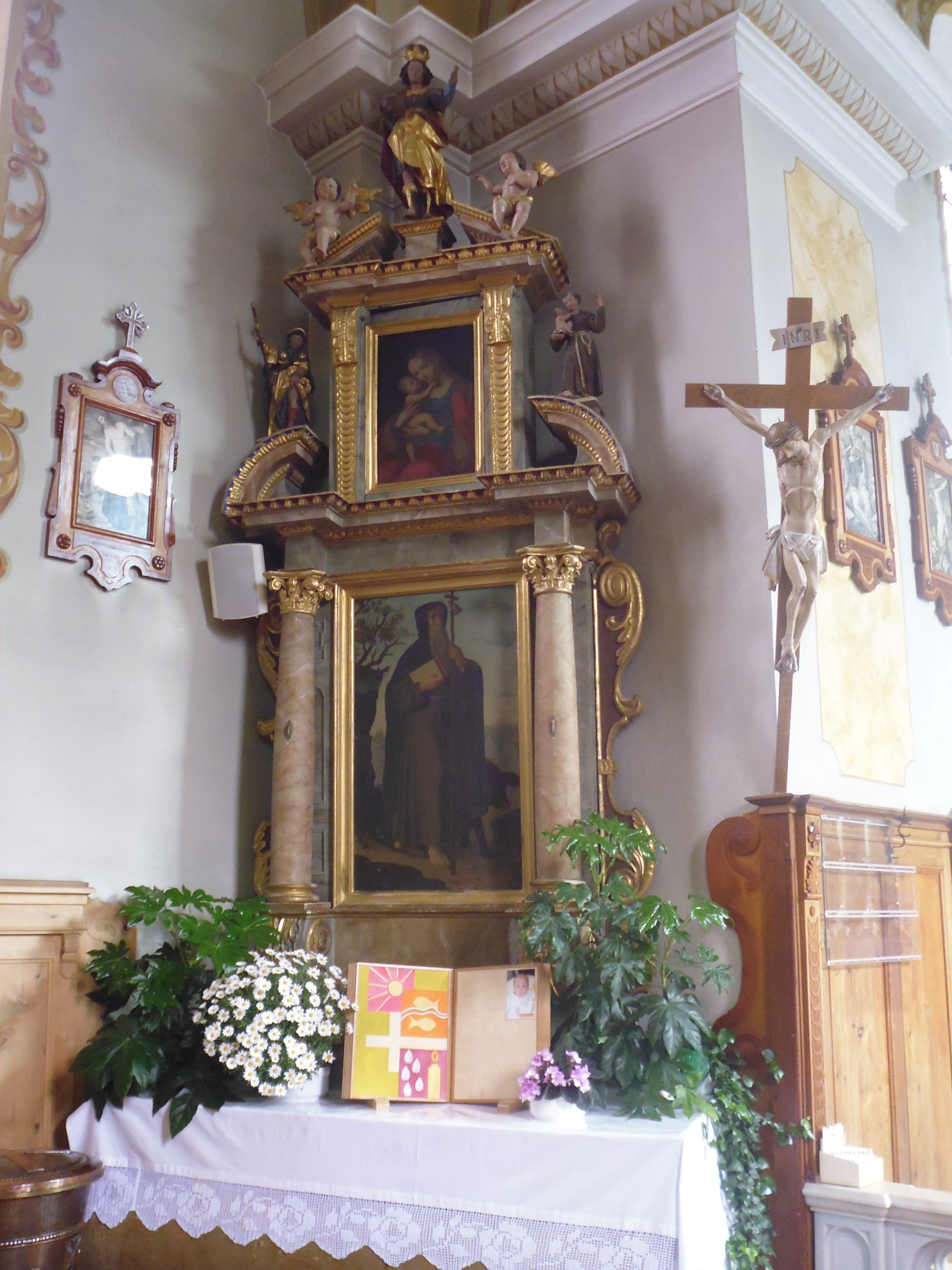 St. Remigius in Eyrs (Laas, Südtirol)